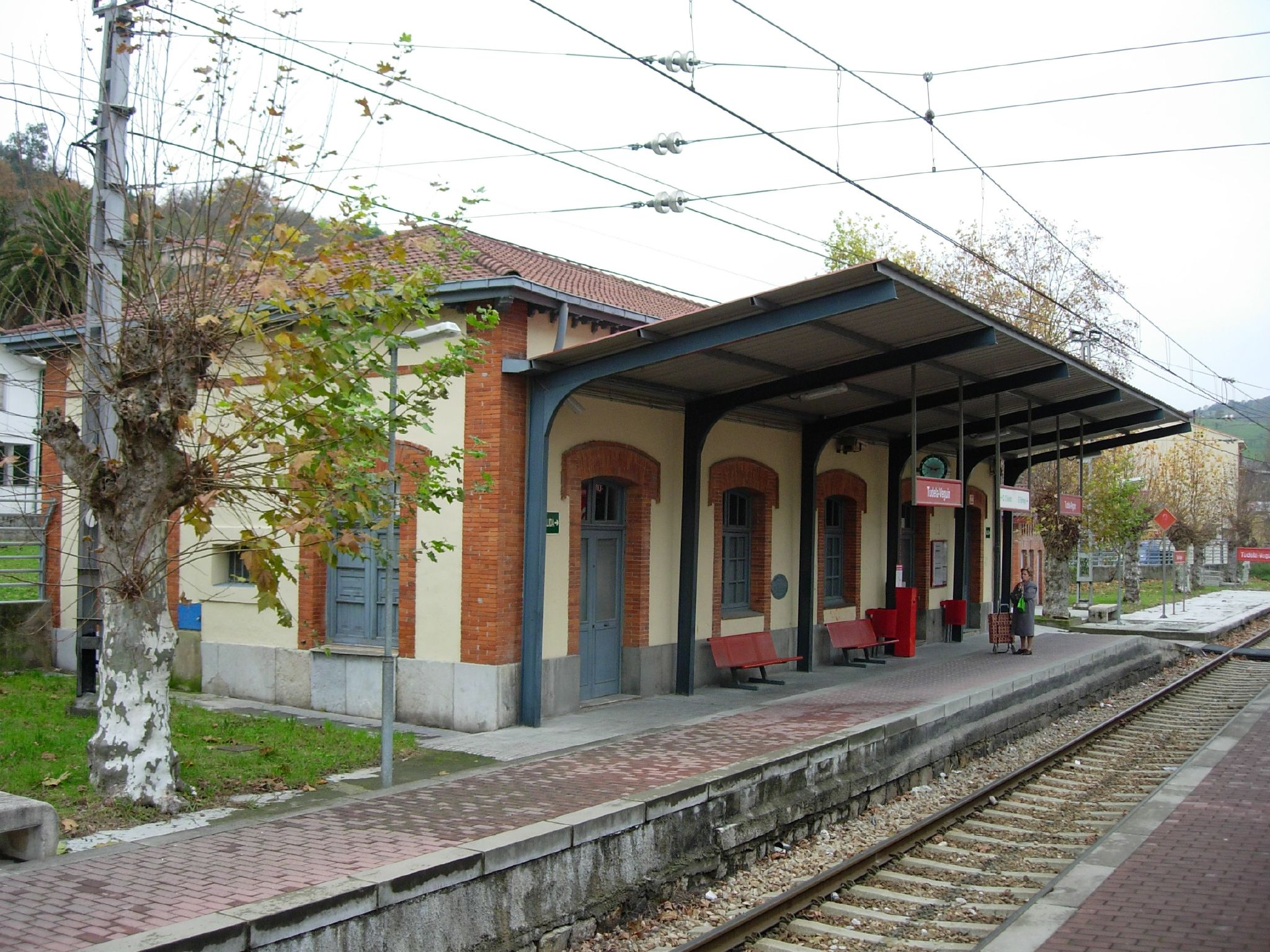 Estación de Tudela-Veguín (Oviedo, Asturias).